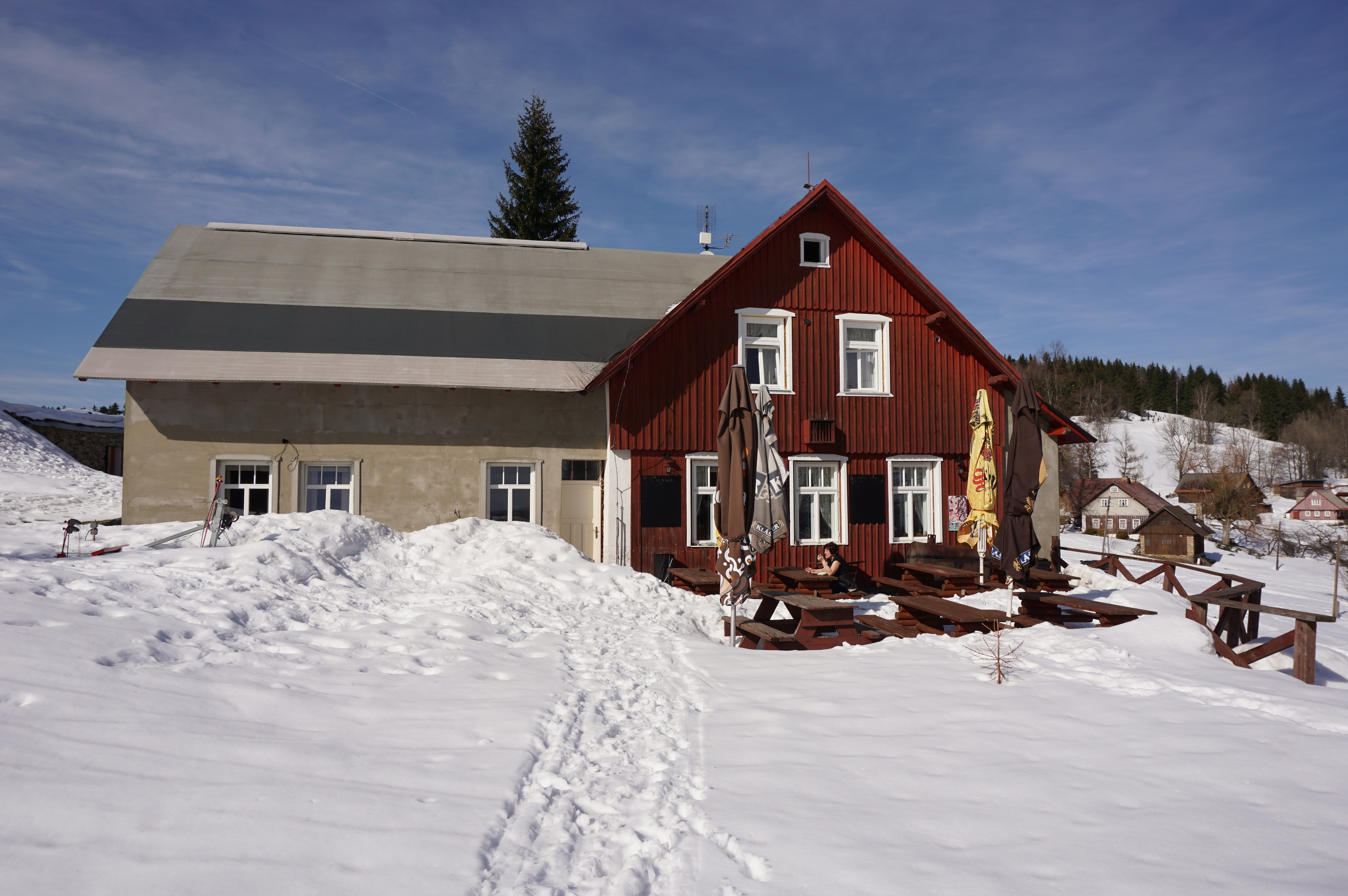 Paseky nad Jizerou - hostinec Na Perlíčku zvaný Prdek (čp. 222) v osadě Hoření Kazdice